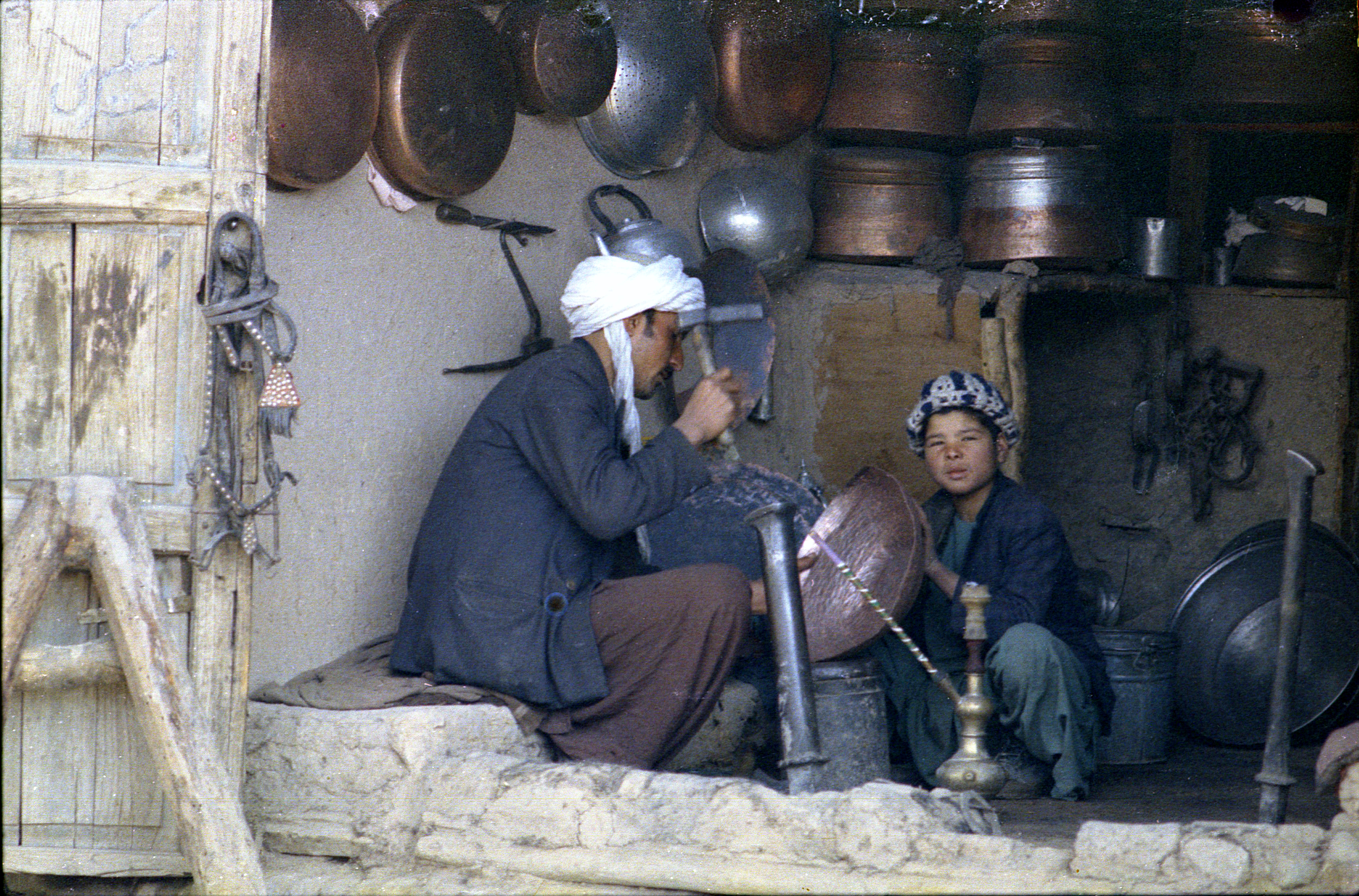 Afghanistan, Herat, chaudronnier en 1974